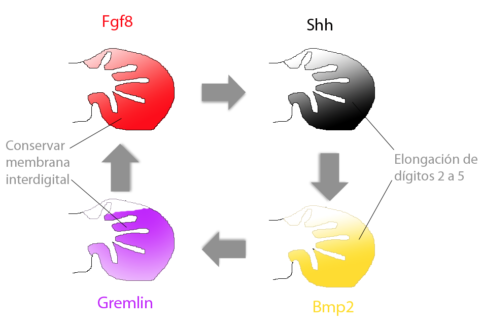 Loop de señalización que comienza con Fgf8 induciendo una segunda expresión de Shh, la que a su vez induce a Bmp2 quien induce a Gremlin